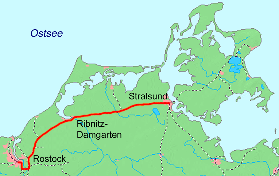 Karte der Bahnstrecke Rostock–Stralsund